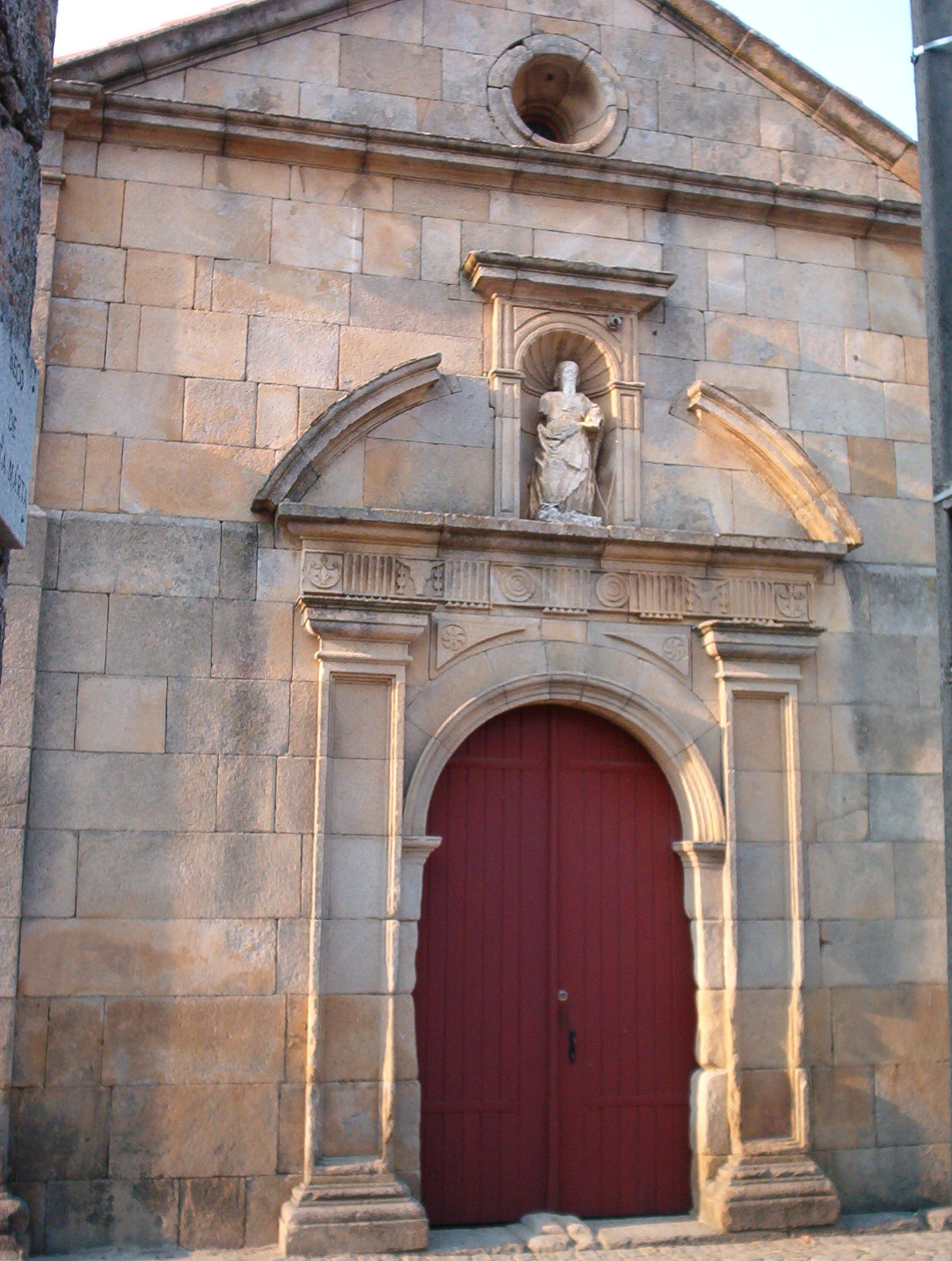 Capela de Santa Marta, freguesia de Melo, concelho de Gouveia, distrito da Guarda, Portugal.